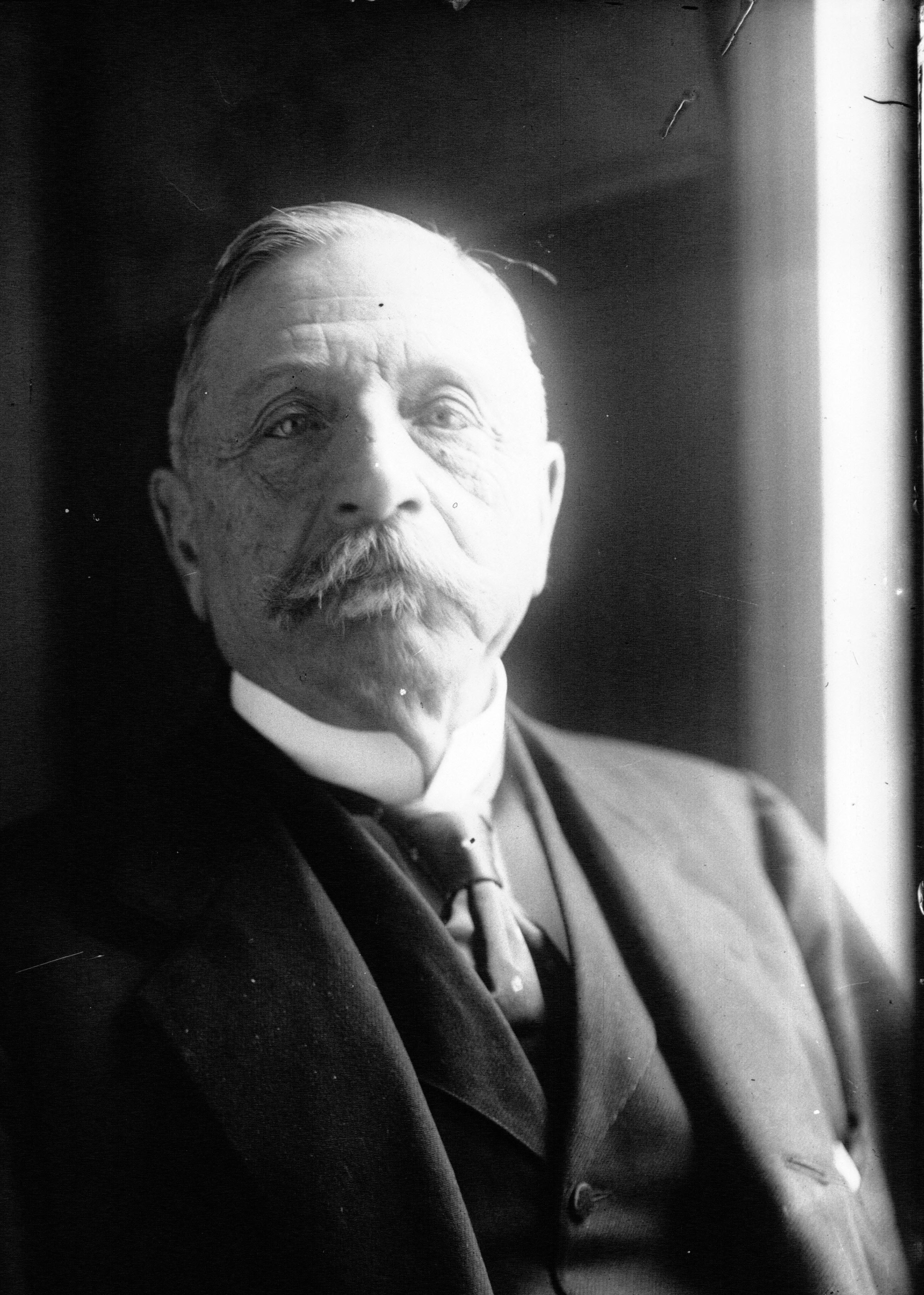 Jacques Piou